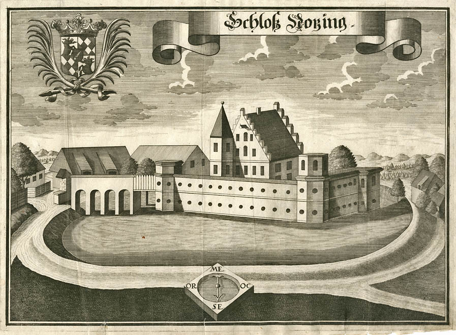 "Schloß Notzing" (Notzing, Gemeinde Oberding), aus : Beschreibung des Churfürsten- u. Hertzogthumbs Ober- und Nidern Bayrn. Rentamt Landshut, 1723